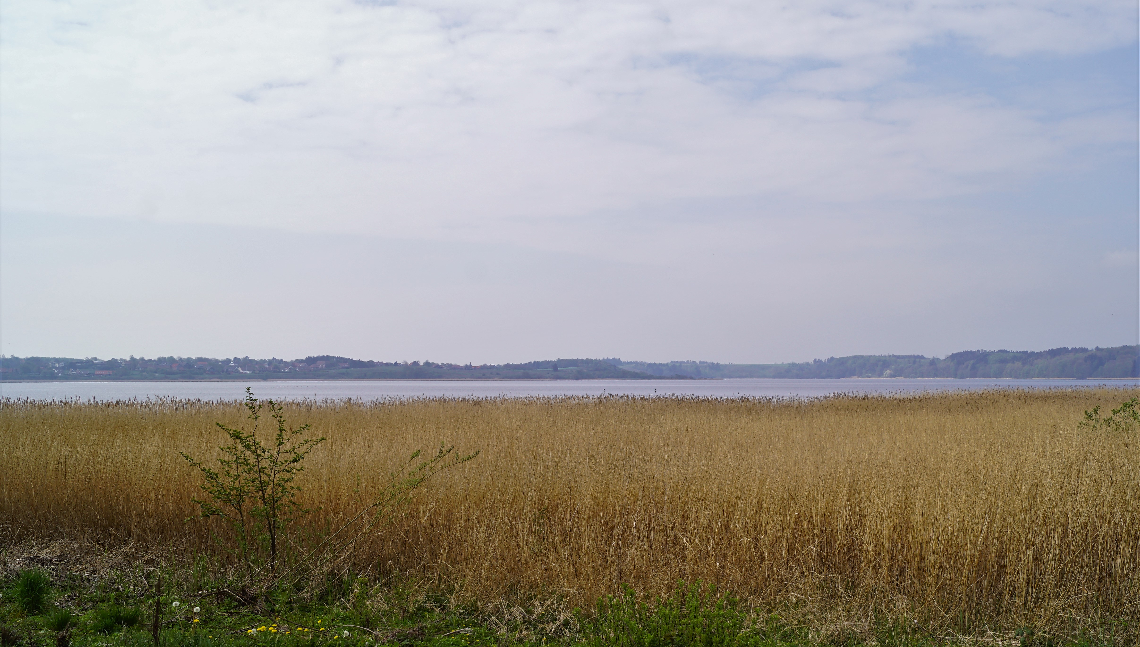 Brakvandssøen Kilen vest for Struer